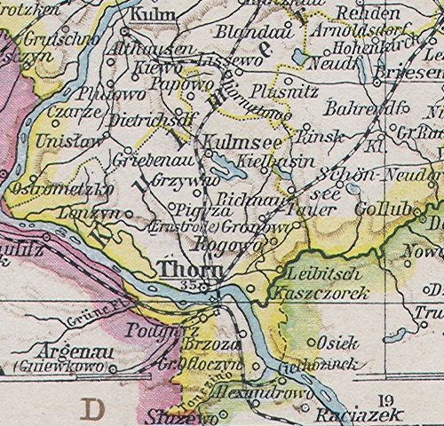 Kreis Thorn, Ausschnitt aus